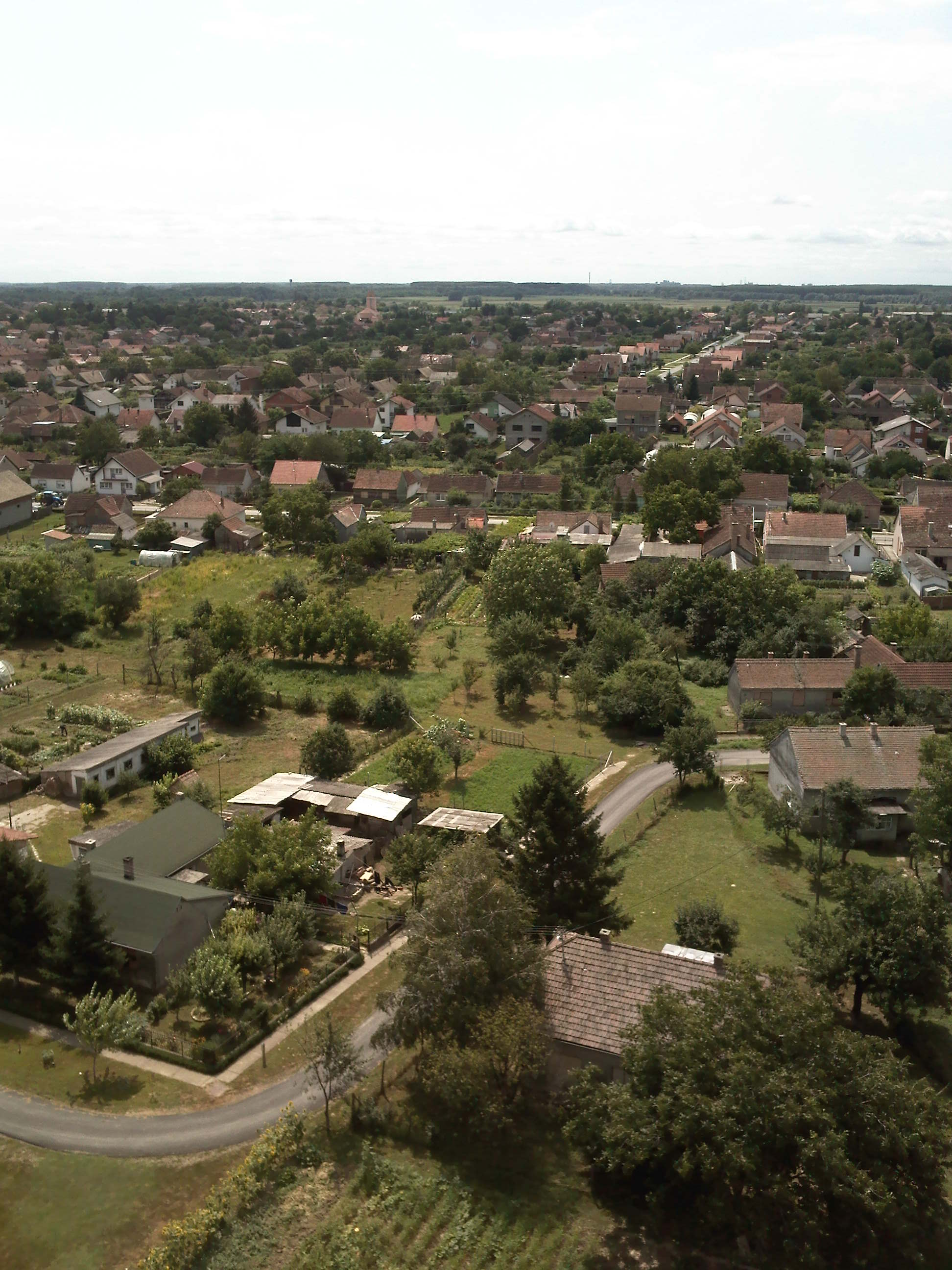 Darda, Croatia